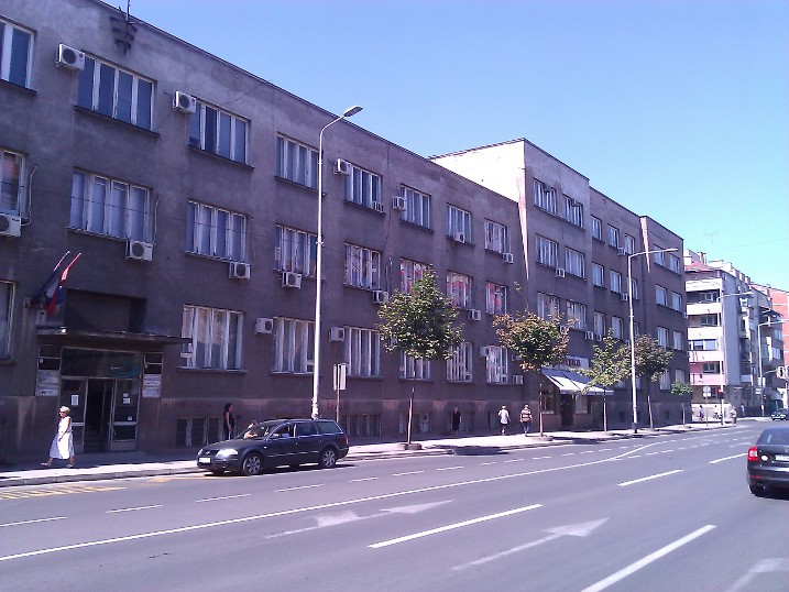 Седиште нишког водовода.